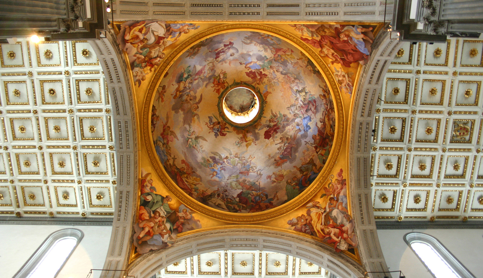 Chorkuppel der Basilica di San Lorenzo di Firenz